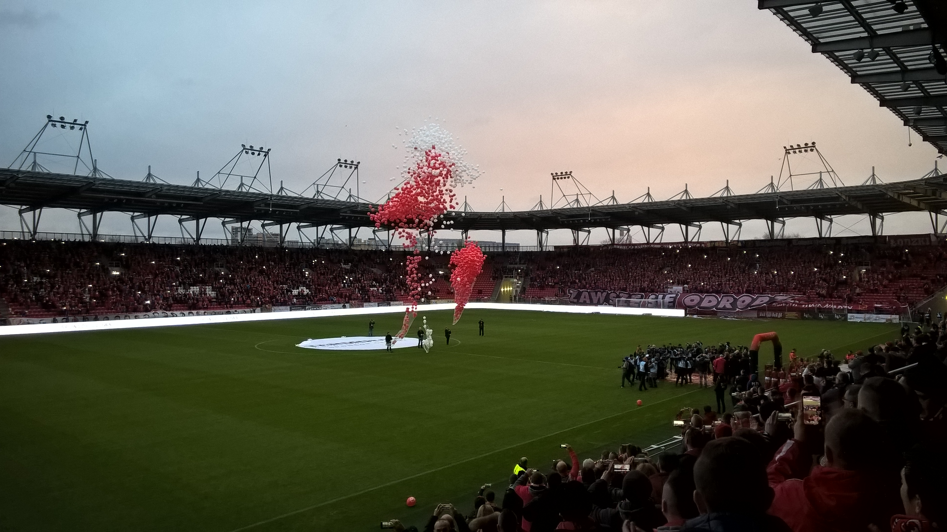 Otwarcie stadionu Widzewa - 18.03.2017